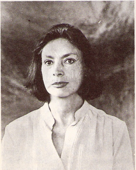 Elvira Orphée, escritora argentina